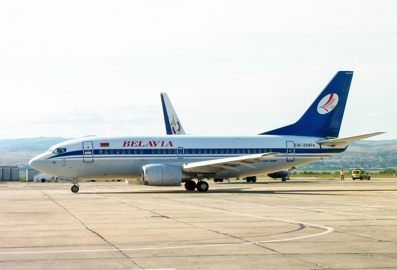 Boeing 737-505 EW-294PA в аэропорту Бургаса